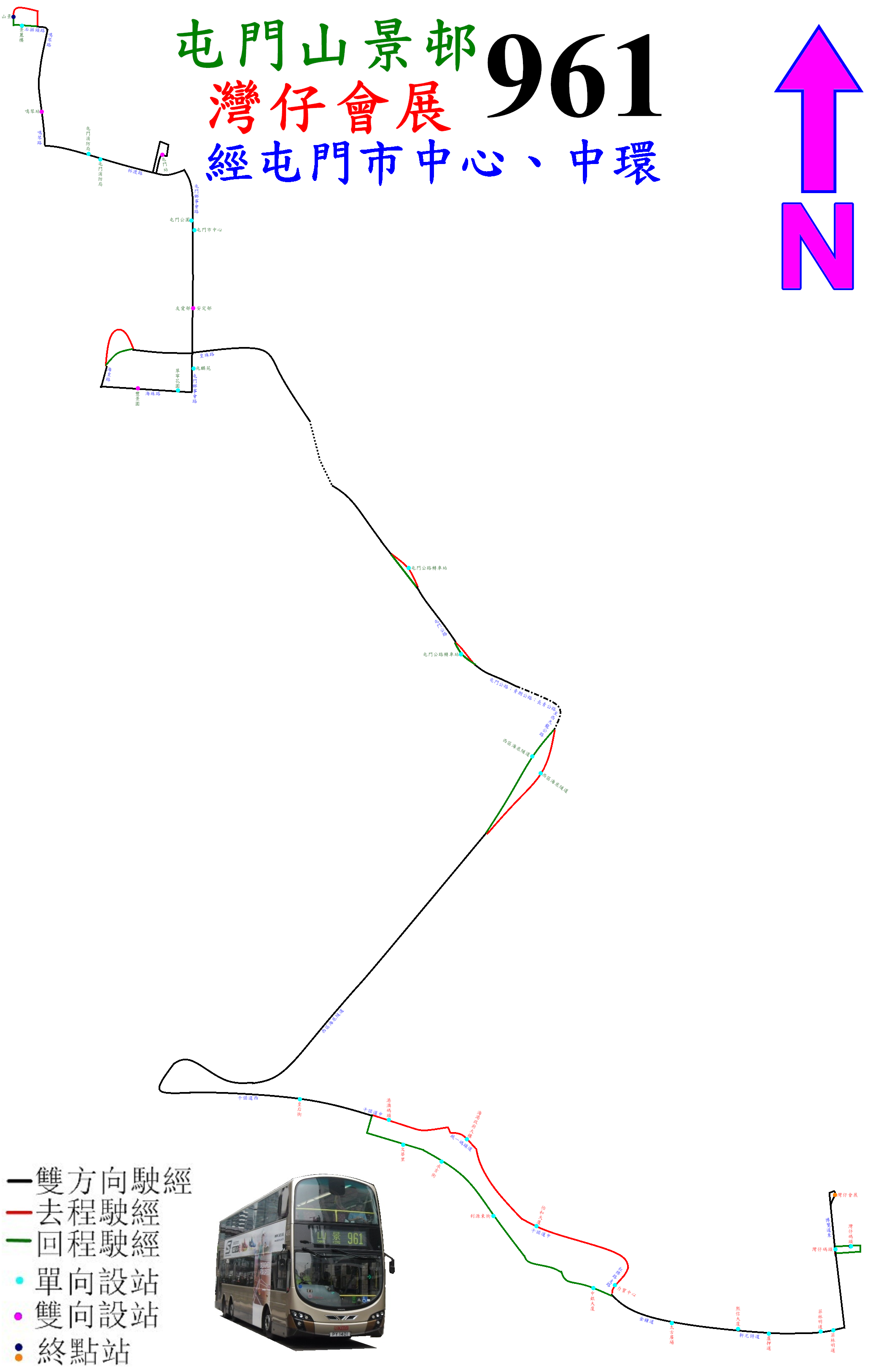 中文（香港）: 過海隧巴961線走線圖